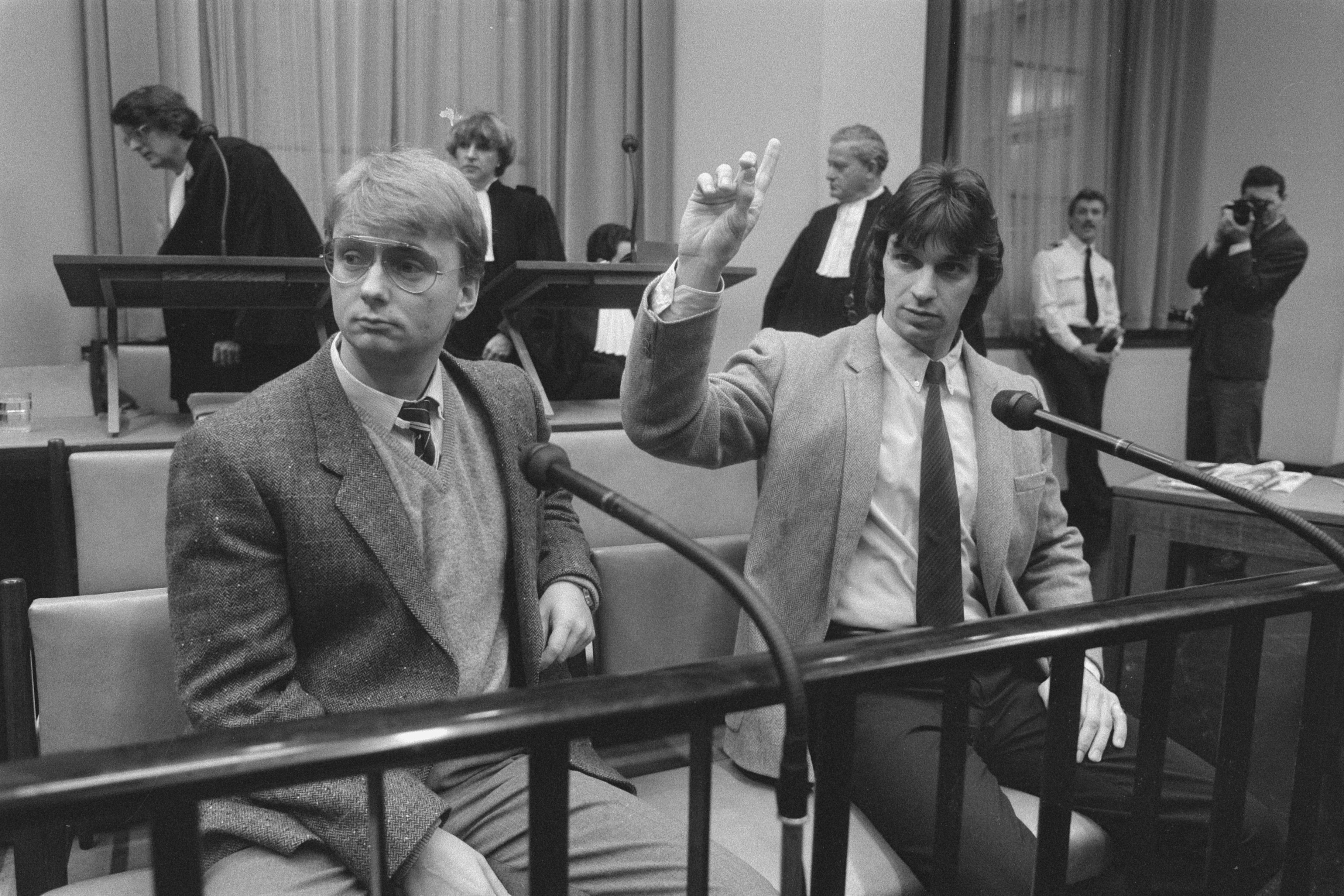 Proces tegen Heinekenontvoerders Cor van Hout en Willem Holleeder (r) in het Paleis van Justitie in Amsterdam. 22 januari 1987